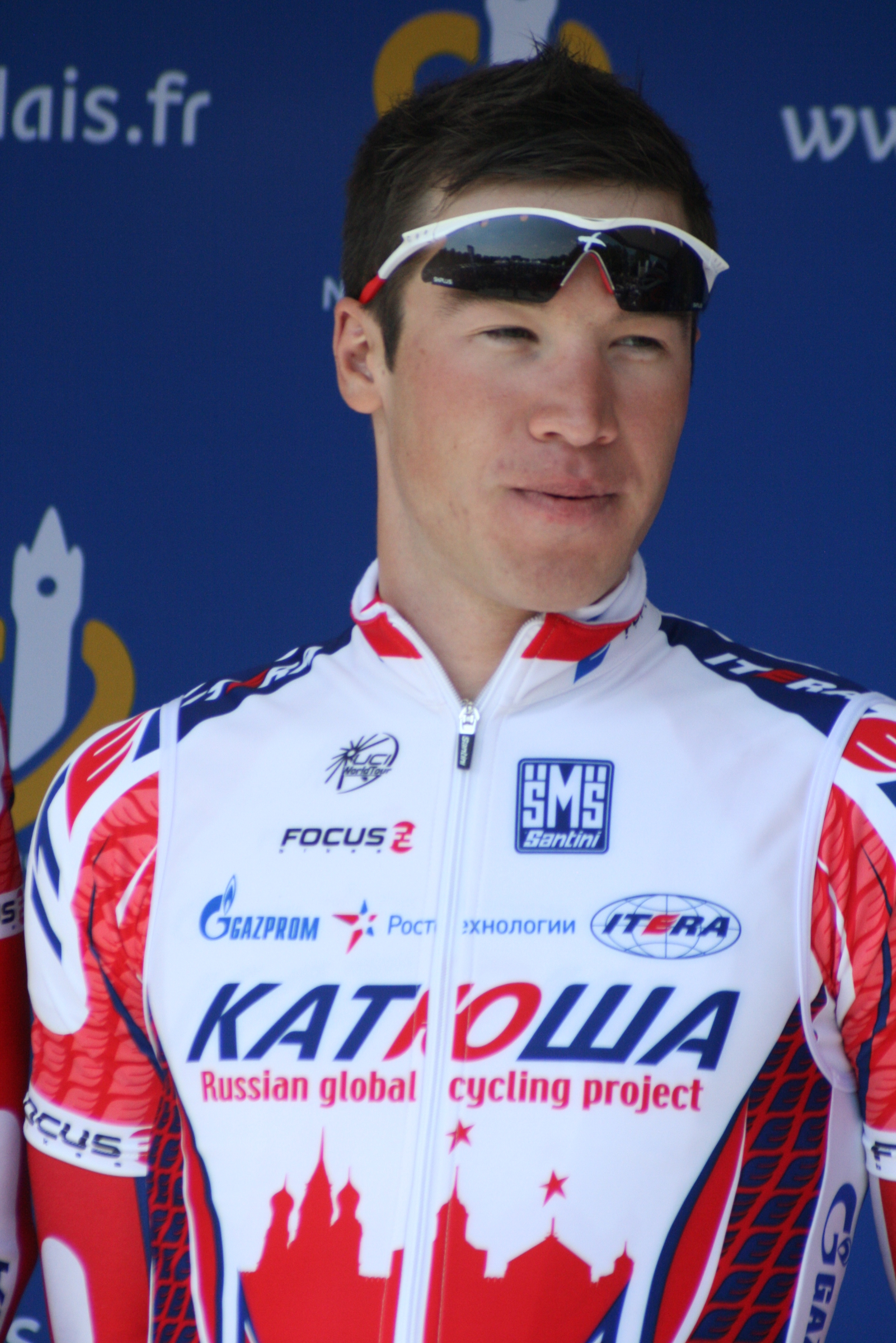 Présentation des coureurs au départ de la première étape Denis Galimzyanov